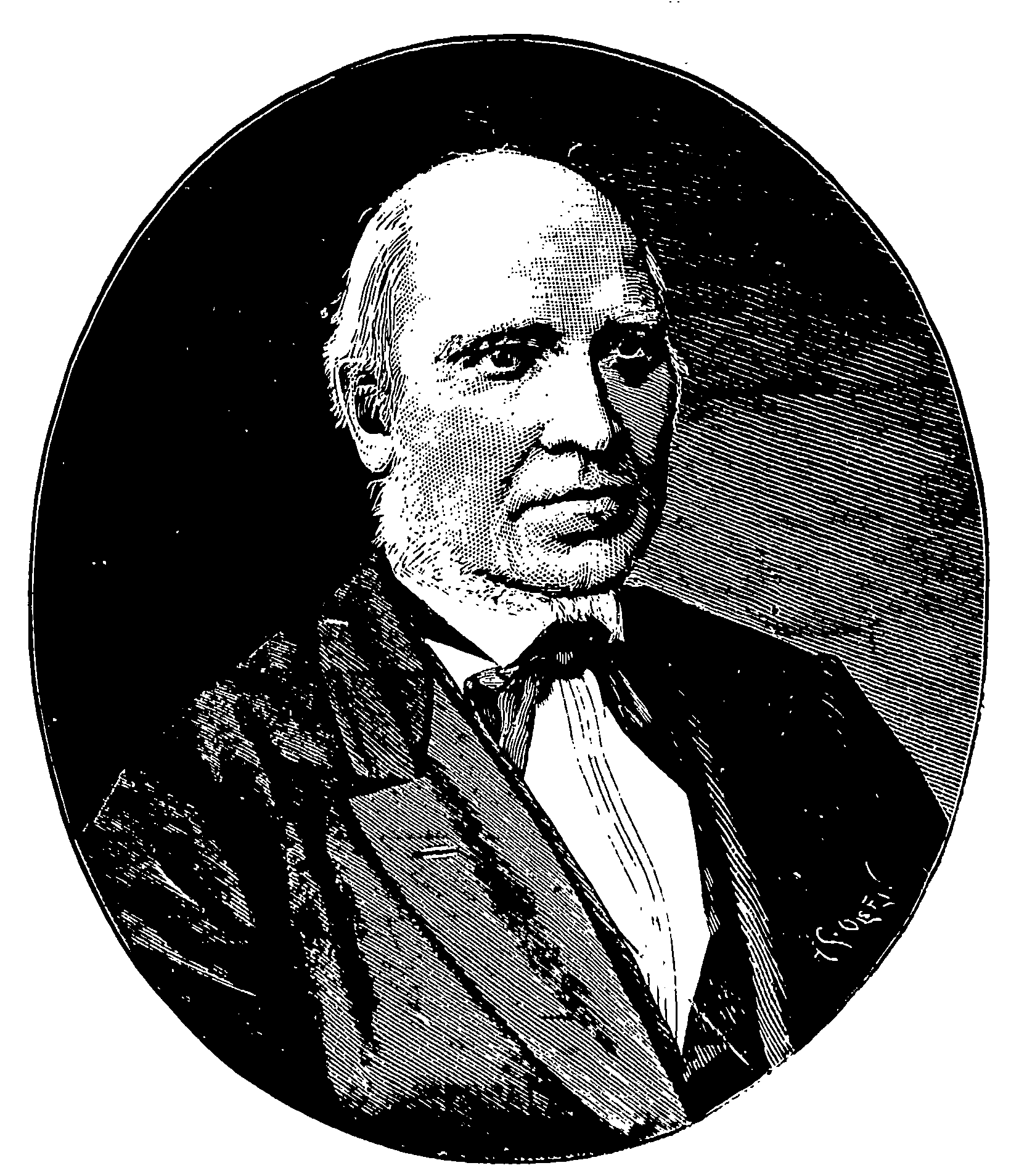 Stortingsmann Mauritz Aarflot.